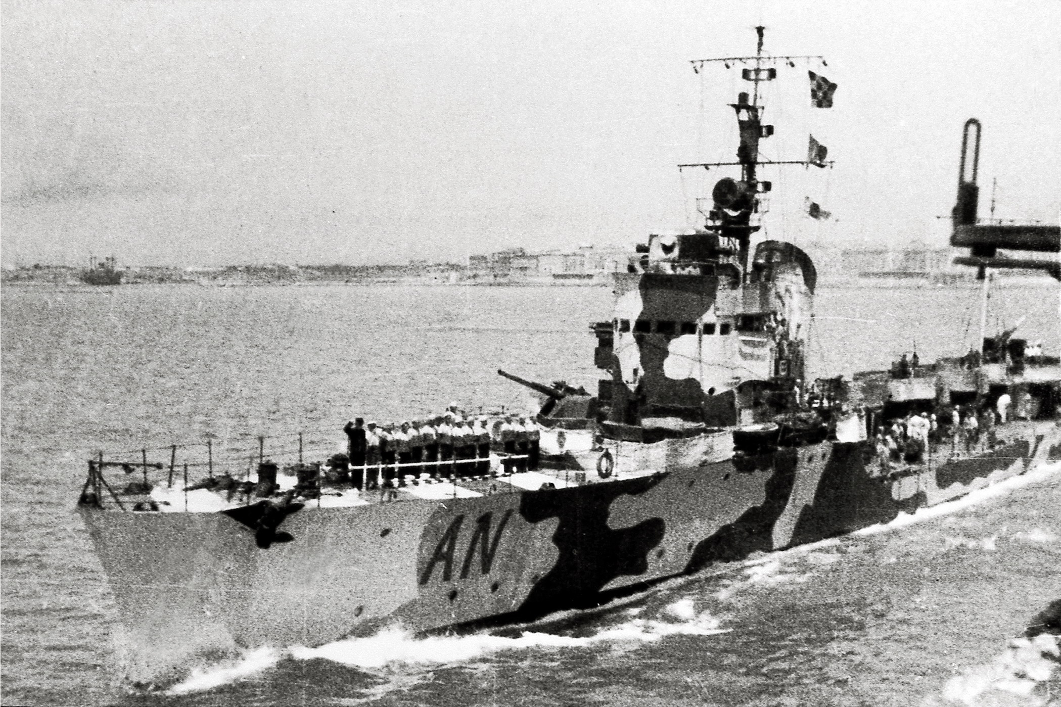 La torpediniera Antares nel 1942 con la pitturazione mimetica; Fonte: Marcello Risolo